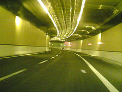 Giovanni XXIII tunnel in Rome